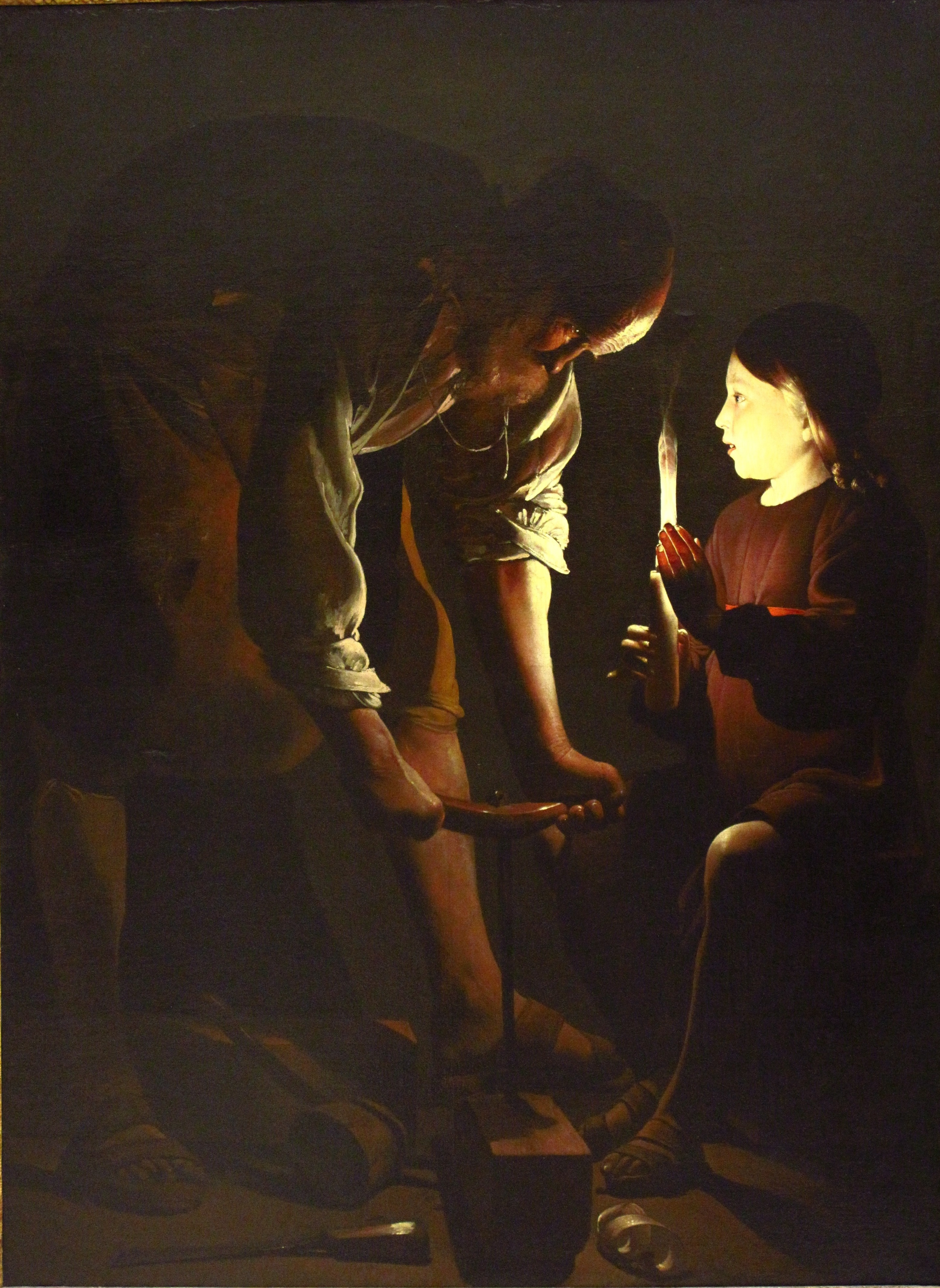 Saint Joseph, patron des charpentiers, travaille une poutre devant l'Enfant Jésus qui semble déjà y voir le bois de sa croix.